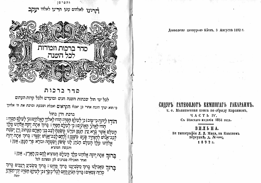 Karaim Siddur printed in Vilnius in 1892 Караимский сиддур, изданный в 1892 году в Вильно (ныне Вильнюс)